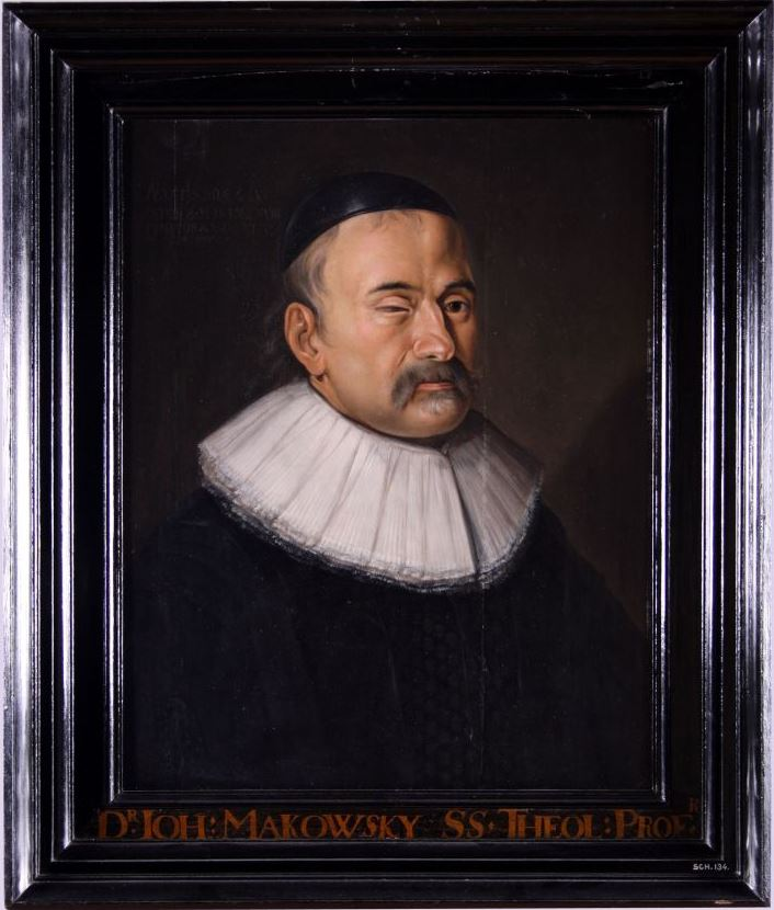 Portret in olieverf van Johannes Maccovius of Makowsky, professor in de godgeleerdheid aan de Franeker universiteit van 1615 tot 1644. Johannes Makowsky (Maccovius) (Lobzenicz (Polen) 1588 - Franeker 24 juni 1644)